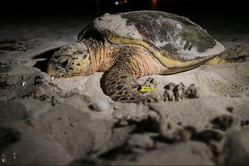 Hawksbill Sea Turtles on Iran’s Kish Island - KISH (Tasnim) – Guards on Iran’s southern island of Kish take care of the hawksbill sea turtles, an endangered species belonging to the family Cheloniidae, which lay clutches of eggs at the seaside and cover them with sand.